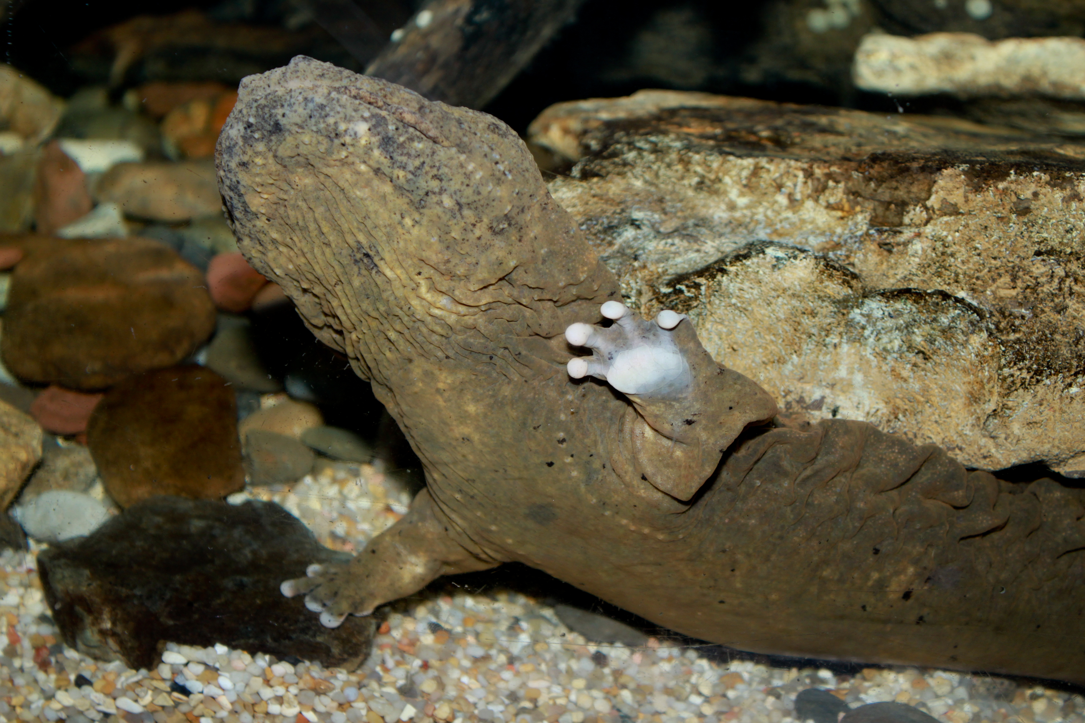 Hellbender Cryptobranchus